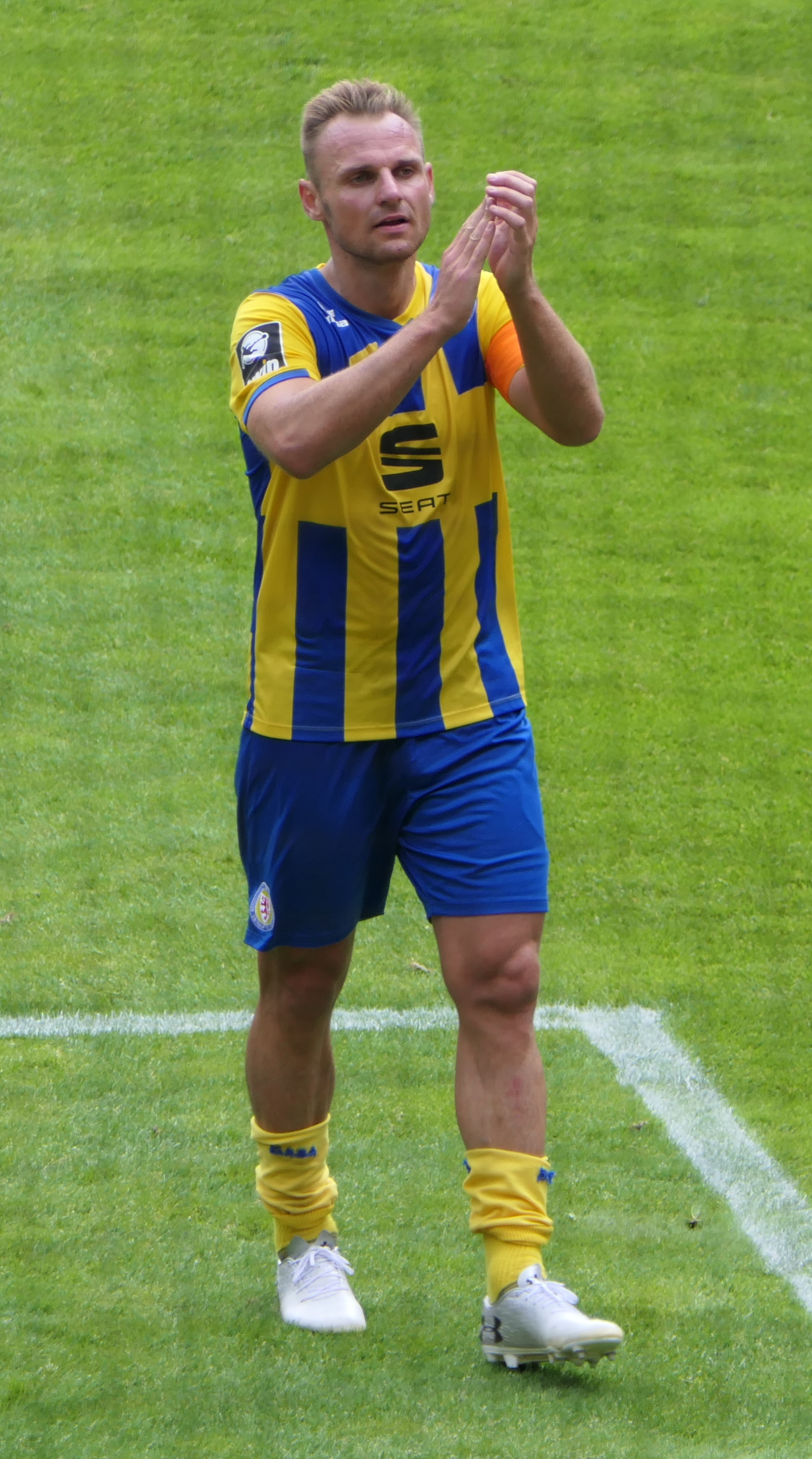 Der Fussballprofi Bernd Nehrig im Trikot von Eintracht Braunschweig beim Auswärtsspiel gegen den 1.FC Kaiserslautern am 18.08.2019.